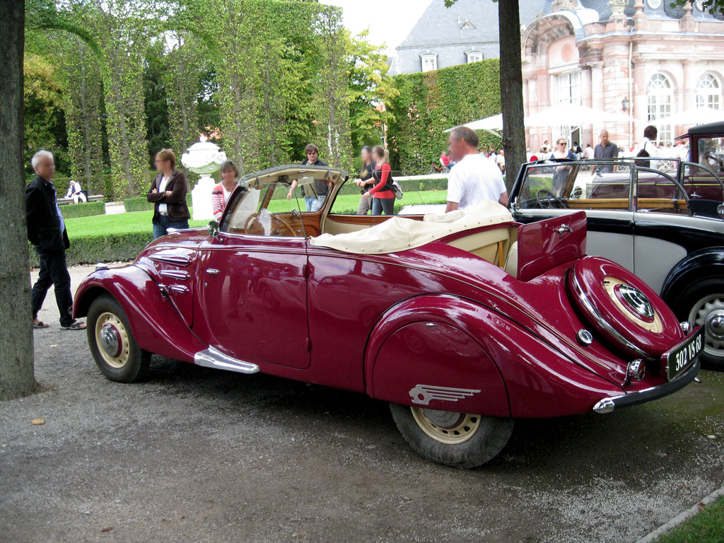 1937 Peugeot 302 Cabriolet_IMG_0284